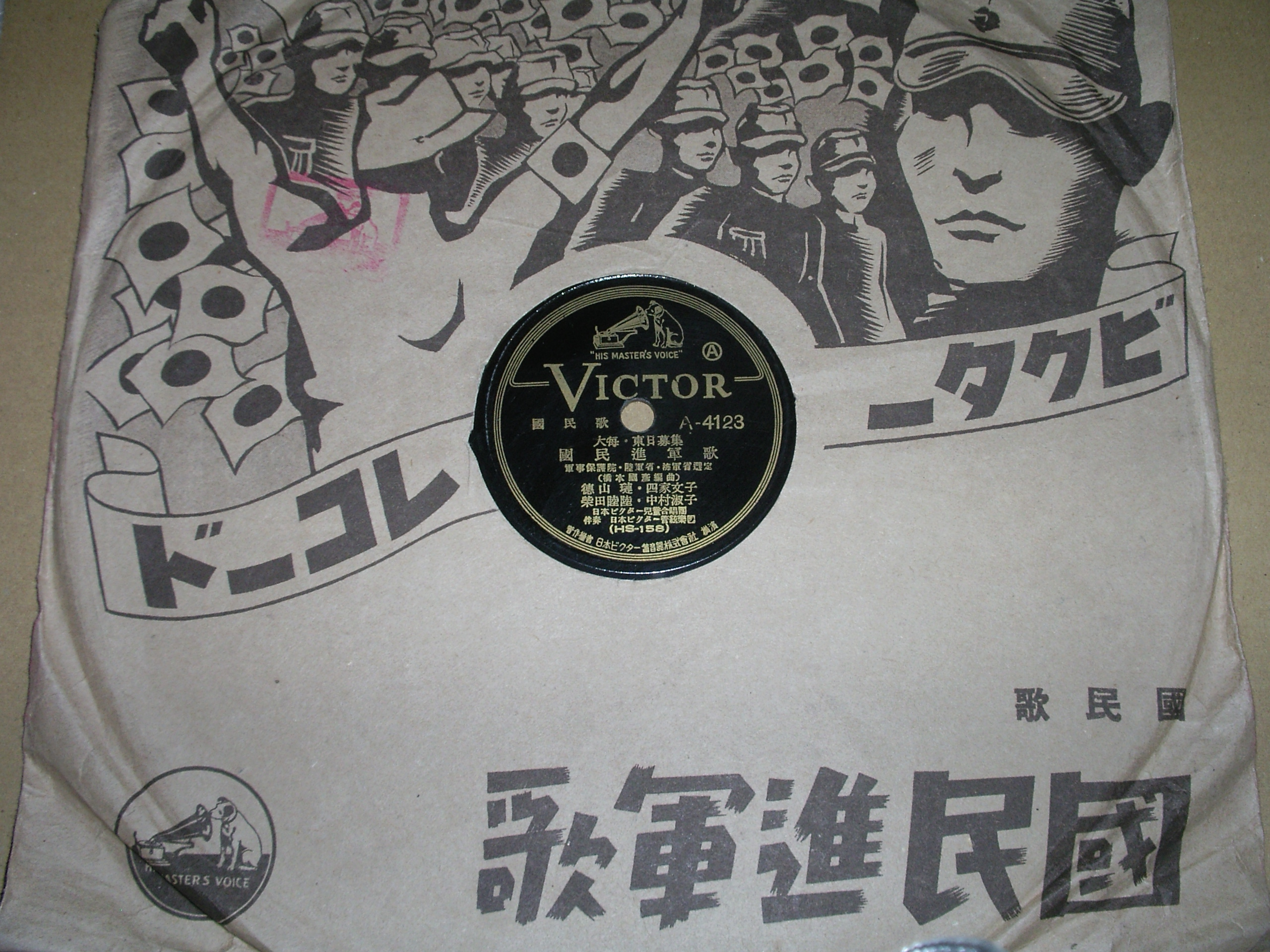 1940年にビクターレコードから発売された国民進軍歌を撮影。